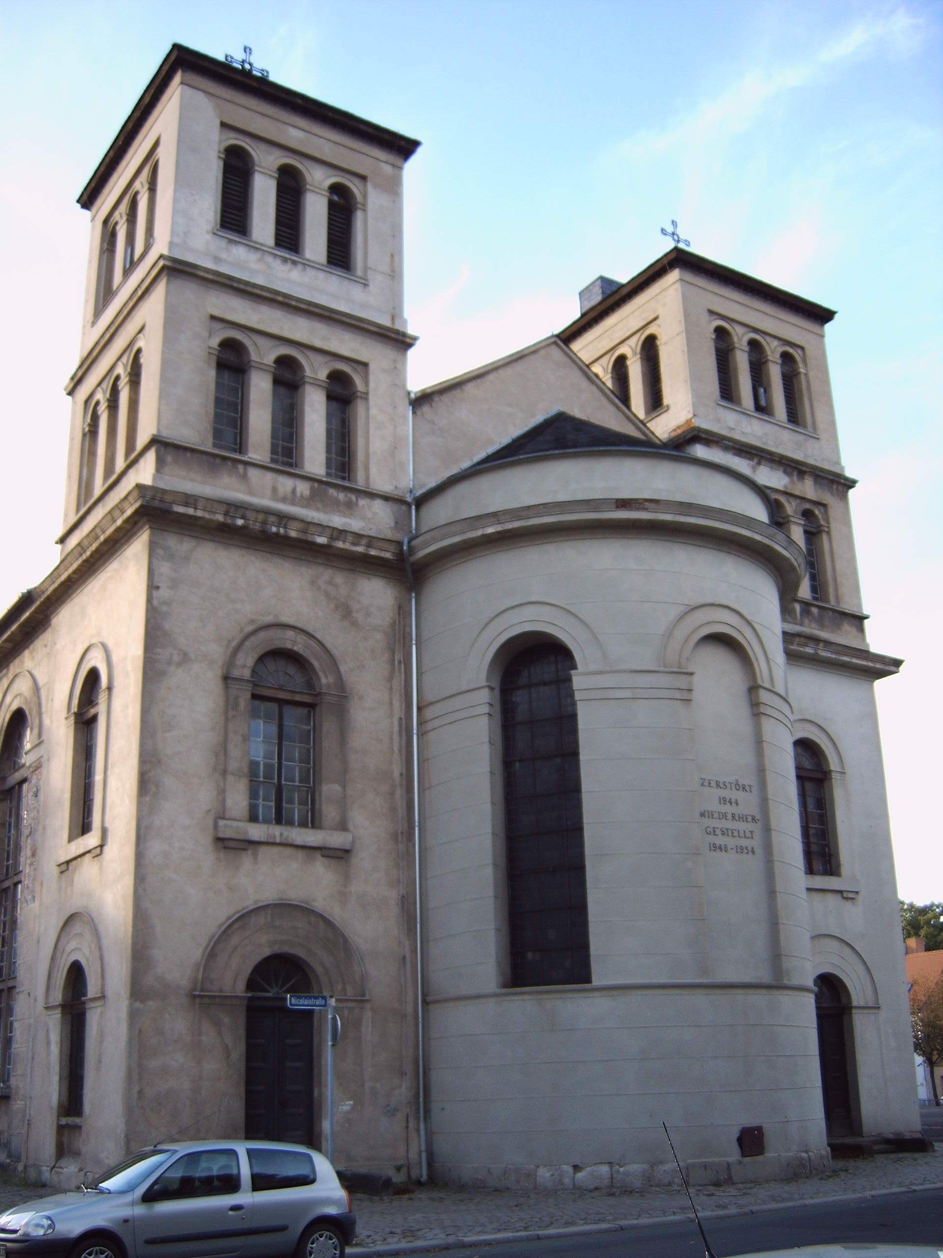 Nicolaikirche in Magdeburg-Neue Neustadt, Ostseite